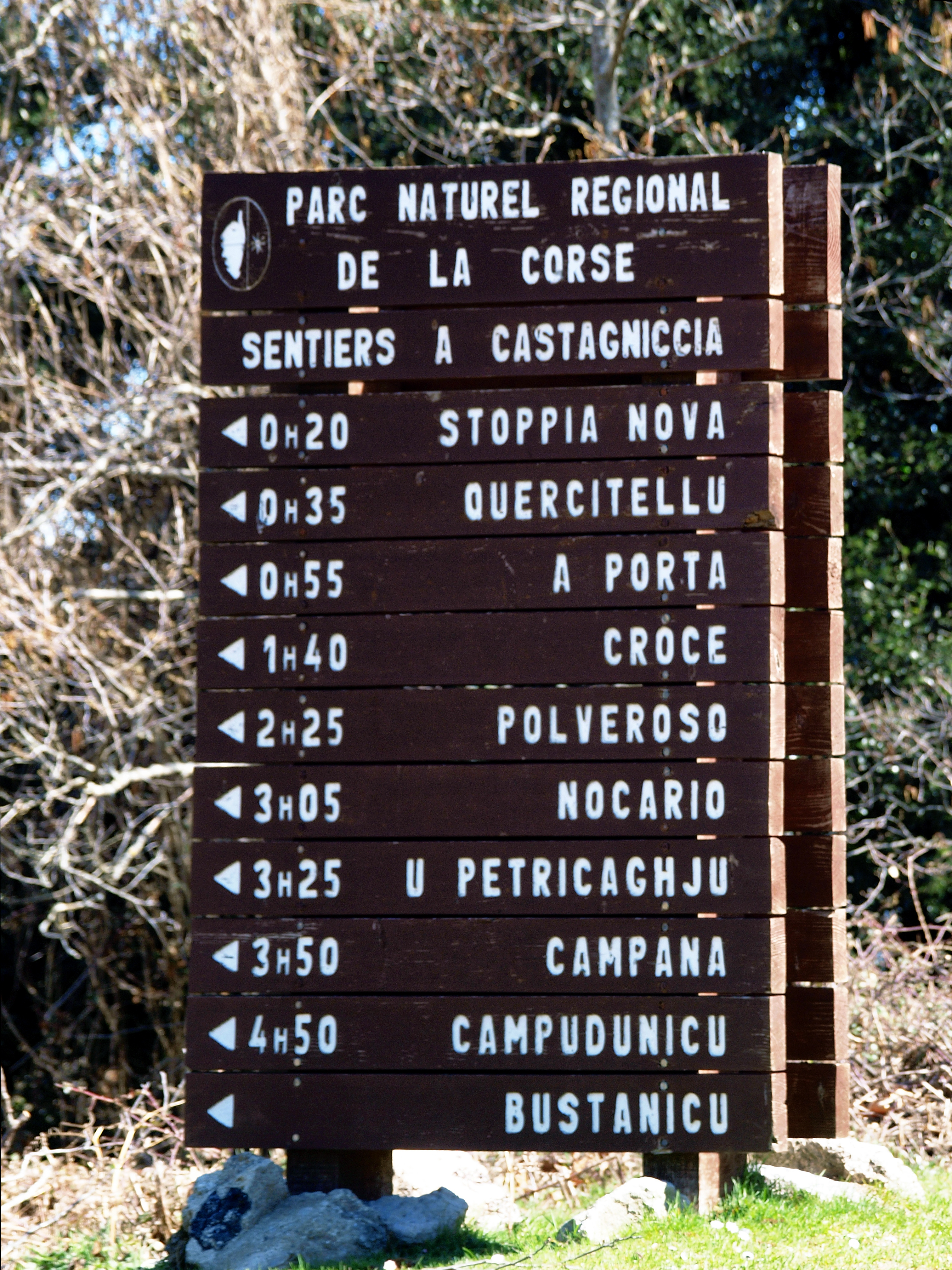 Quercitello, Castagniccia (Corse) - Signalétique des sentiers du PNRC au col de Prato